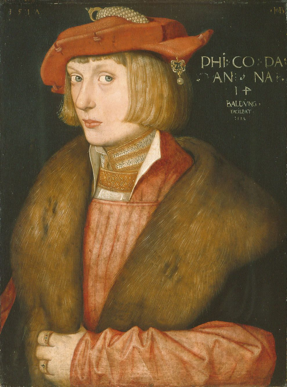 Philipp der Streitbare, Pfalzgraf bei Rhein (* 12. 11. 1503 in Heidelberg † 4. 7. 1548 ebenda) war Sohn von Pfalzgraf Ruprecht und Elisabeth von Bayern-Landshut sowie jüngerer Bruder von Ottheinrich. Seit 1532 Träger des Orden des Goldenen Vlieses. Auf diesem Jugendbildnis trägt er Pelzkragen (Zobel, Marder?) mit im Fell belassenen Pfötchen.